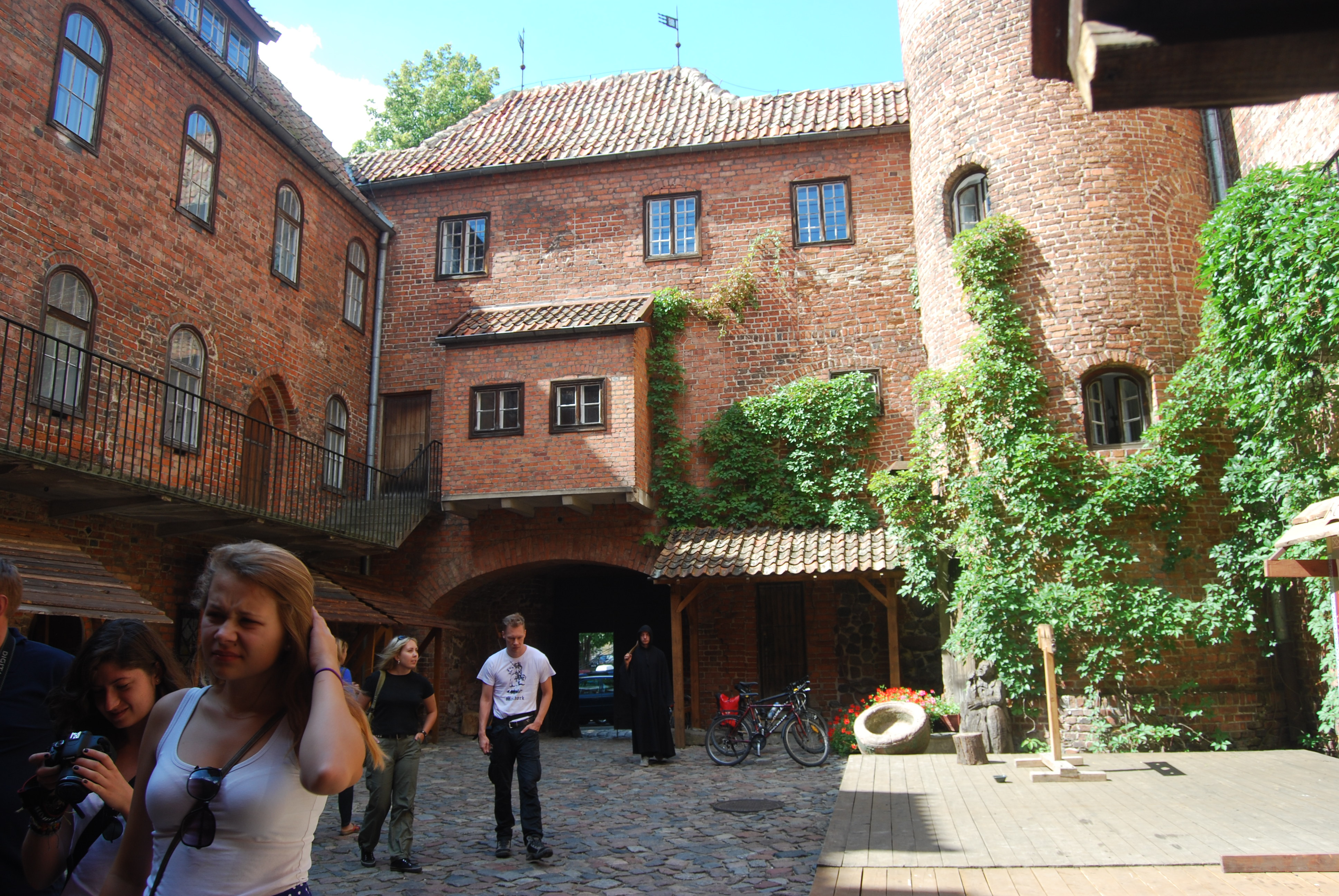 Kętrzyn, zamek, XIV, XX